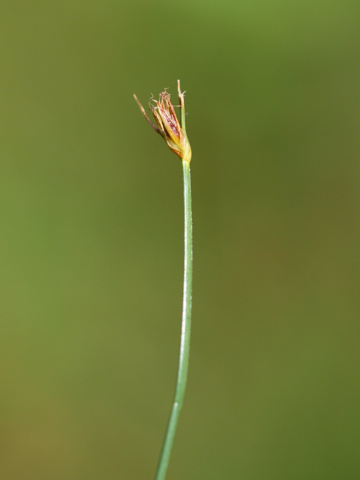 Wenigblütige Sumpfbinse (Eleocharis quinqueflora)